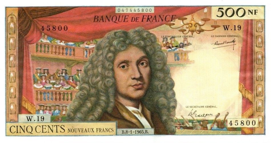 500 francia frank bankjegy Molière-típus 1965, előoldal.